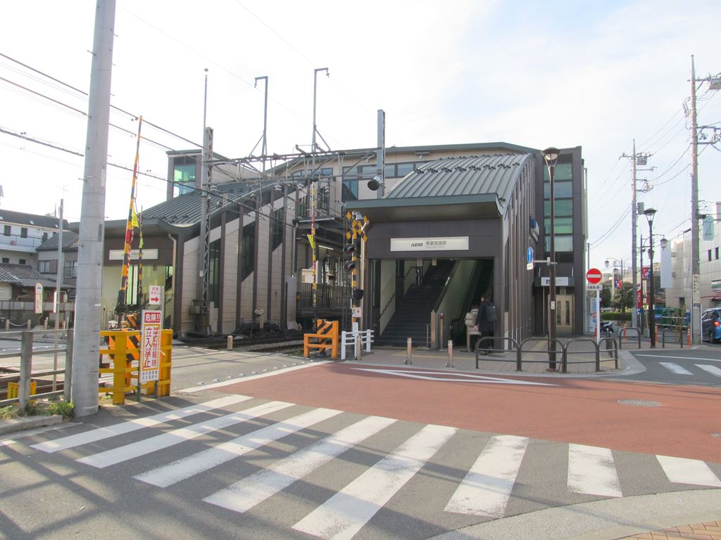 京王線。多磨霊園駅。東京都府中市